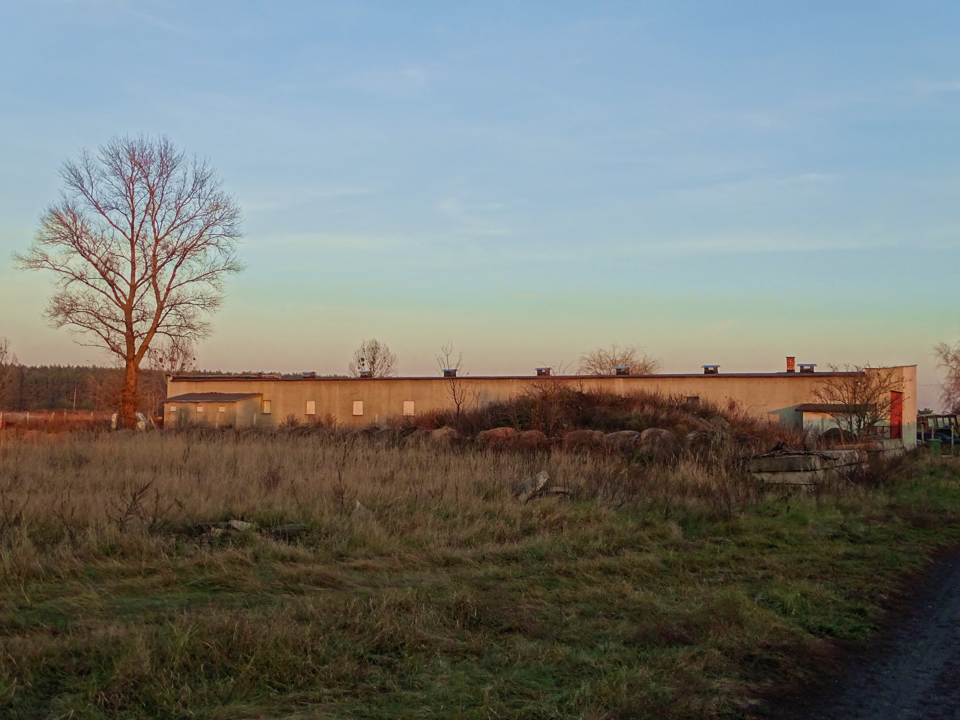 Murowany dawny barak esesmanów, strażników niemieckiego obozu pracy w Miłoszycach, filii obozu koncentracyjnego Gross-Rosen. Widok od zachodu.